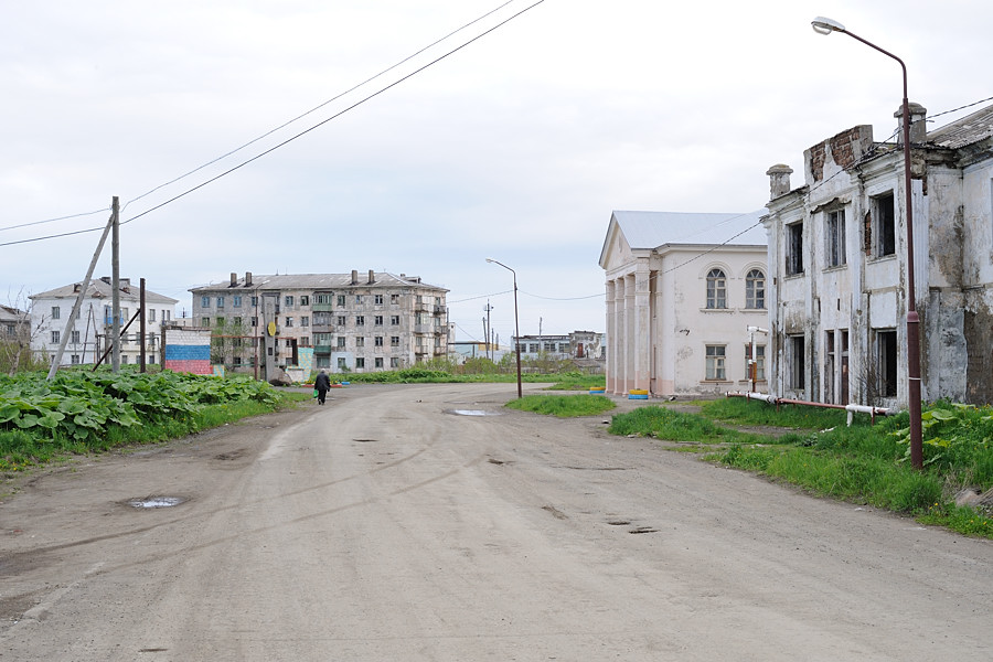 ul. Lenina in Tschechow (Sachalin)